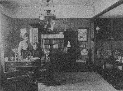 Illustration till artikel om Stina Quints gärning i feministiska tidskriften Dagny 1909.